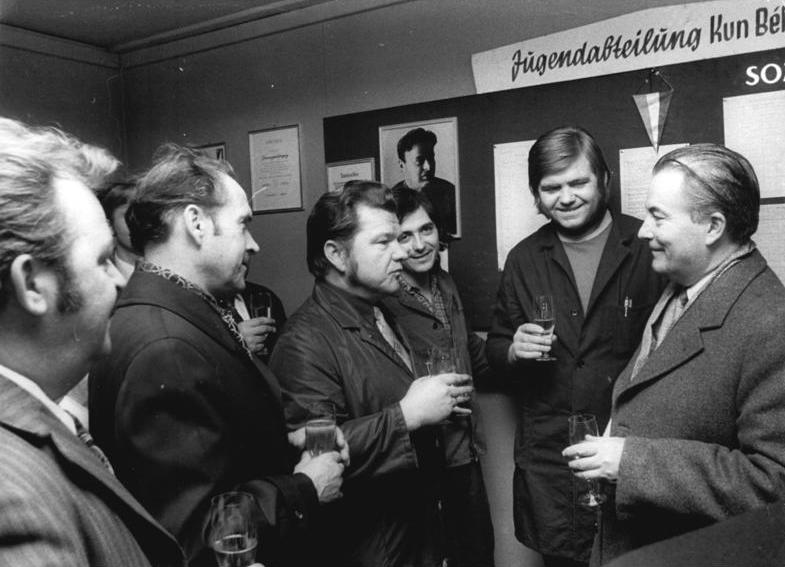 Chemnitz, Frigyes Puja mit Frigyes Puja ADN-ZB Spremberg 4.3.75-st-1a-Karl-Marx-Stadt: UVR-Außenminister besuchte Zahnschneidemaschinenfabrik "Modul"- Herzliche Begegnung in der Jugendabteilung "Kun Bela", in der unge ungarische Werktätige arbeiten. -r- UVR-Außenminister Prigyas Puja. -l- Betriebsdirektor Wolfgang Sachse, -2.v.l.- DDR-Außenminister Oskar Fischer. (vergl. ADN-Meld. v. 4.3.75)